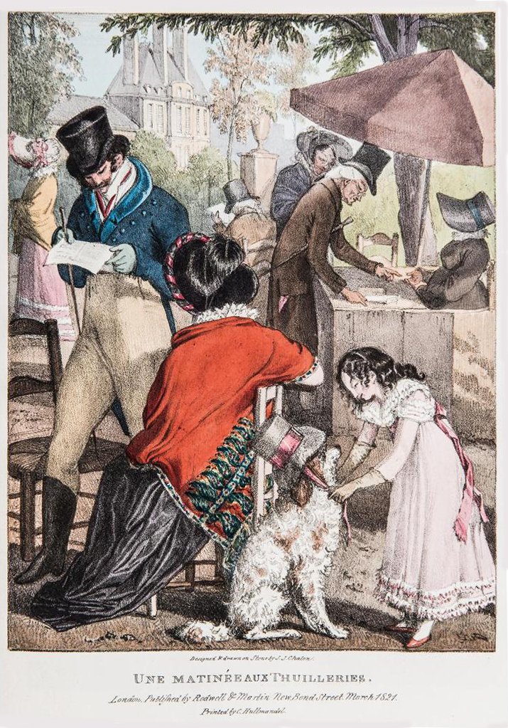 Une matinee aux Thuilleries